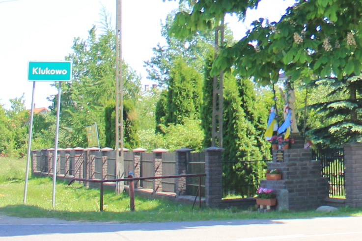 Klukowo - wieś w Polsce położona w województwie mazowieckim, w powiecie ostrowskim, w gminie Małkinia Górna